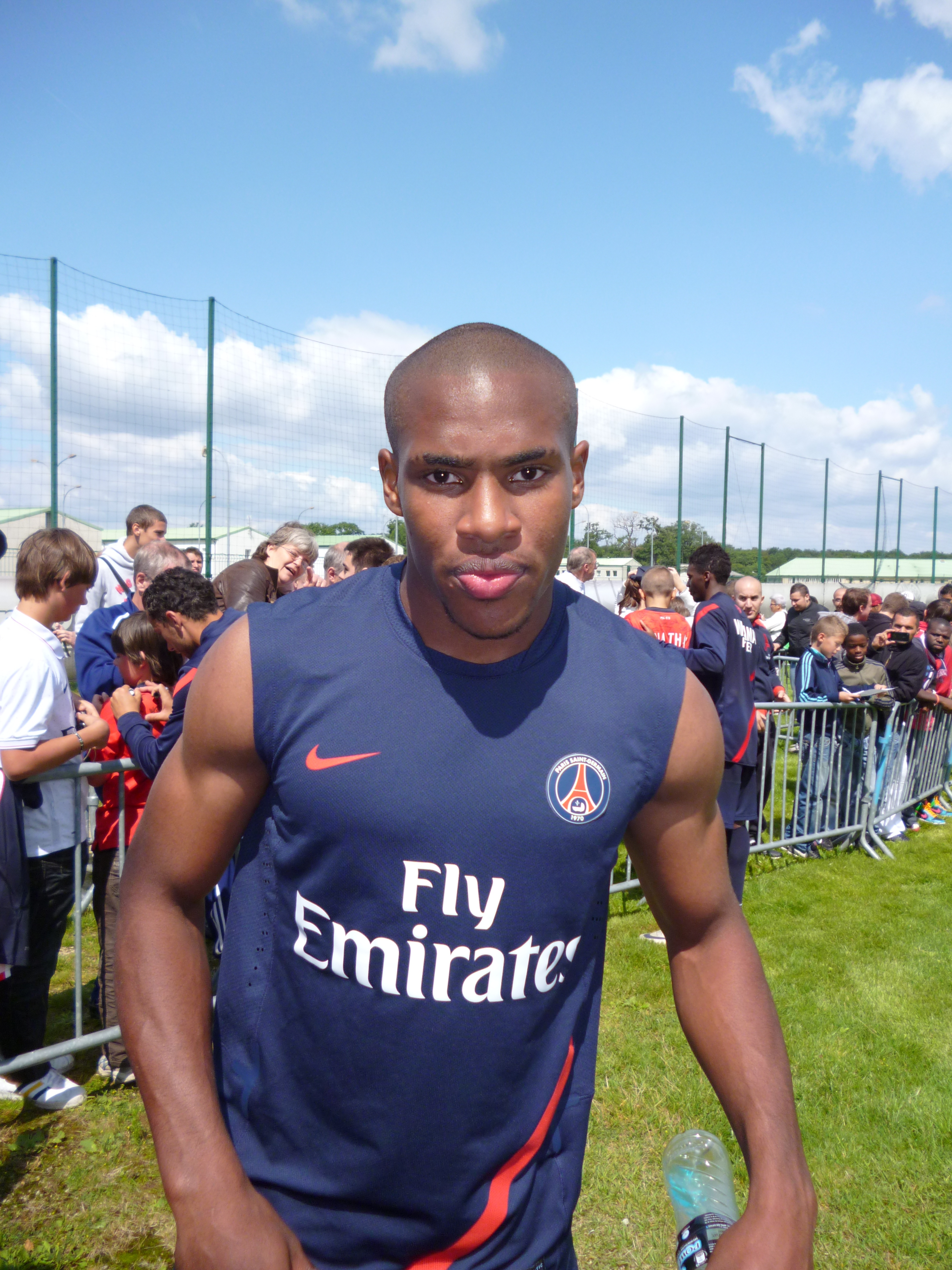 Loïck Landre au Camp des Loges le 24 juillet 2011. Photo Vincent Hanquet pour